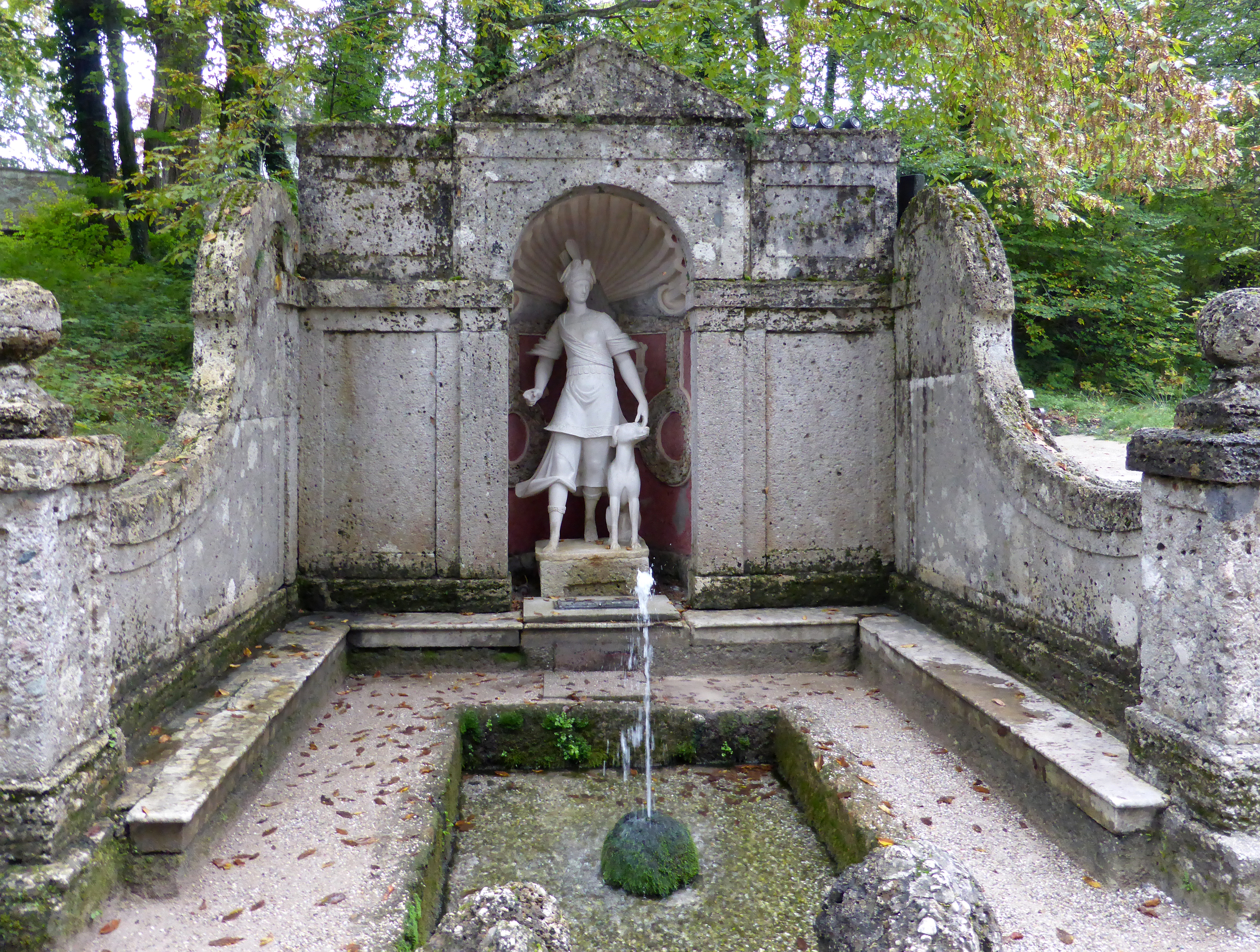 Wasserspiele Schloss Hellbrunn (Dianabrunnen), Salzburg.